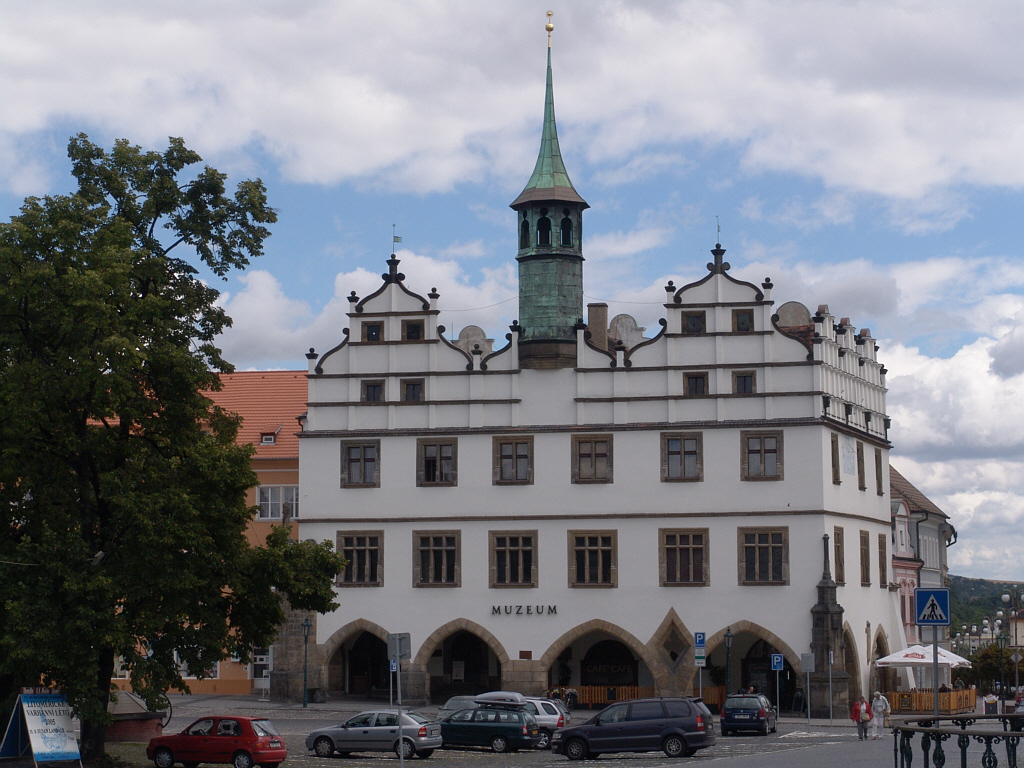 Museum (Foto von 2005).